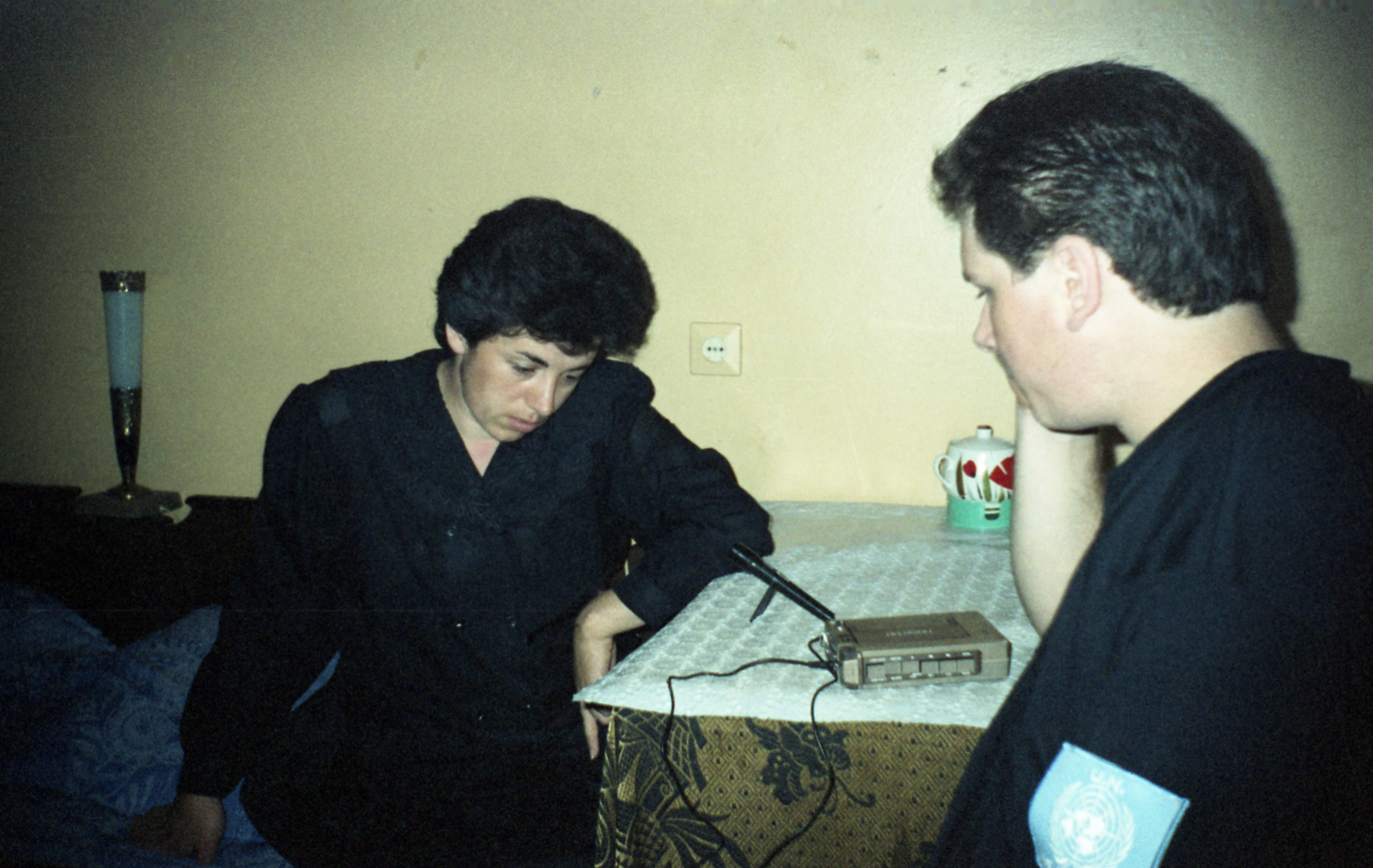 Лушников